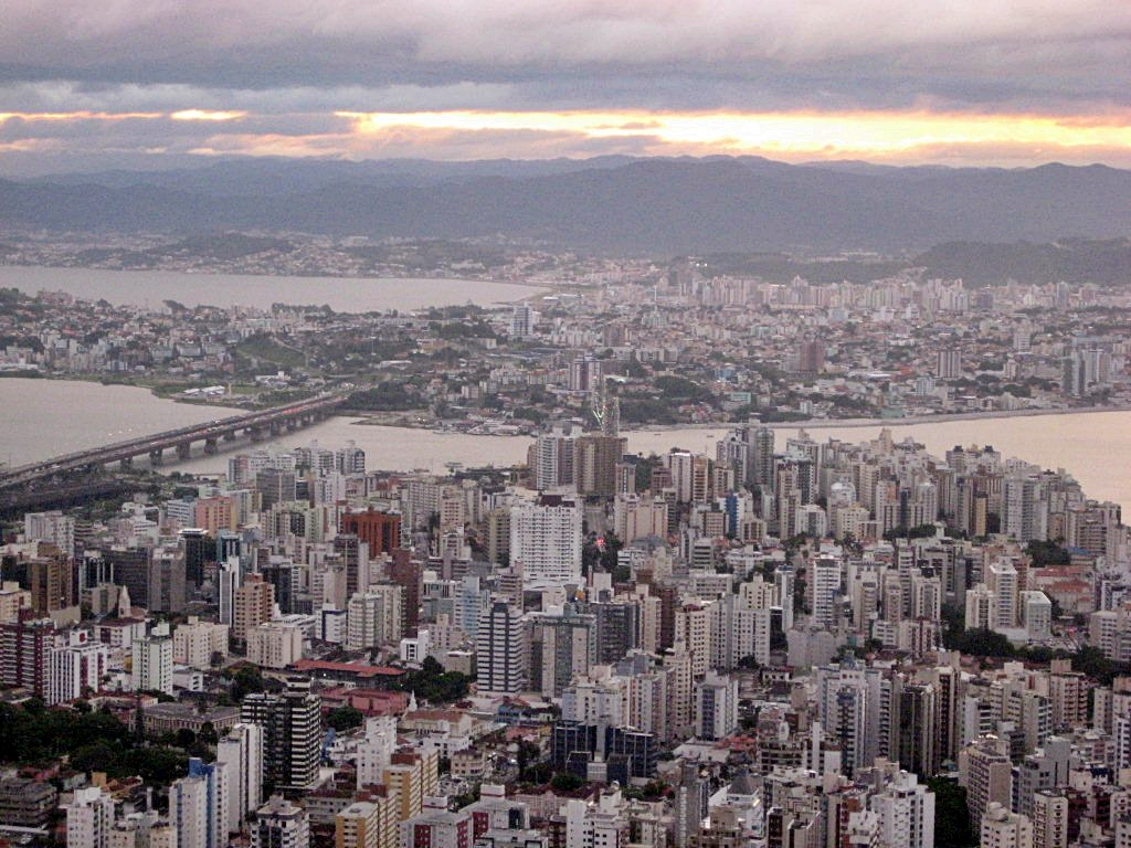 Centro da cidade de Florianópolis, Santa Catarina, Brasil.